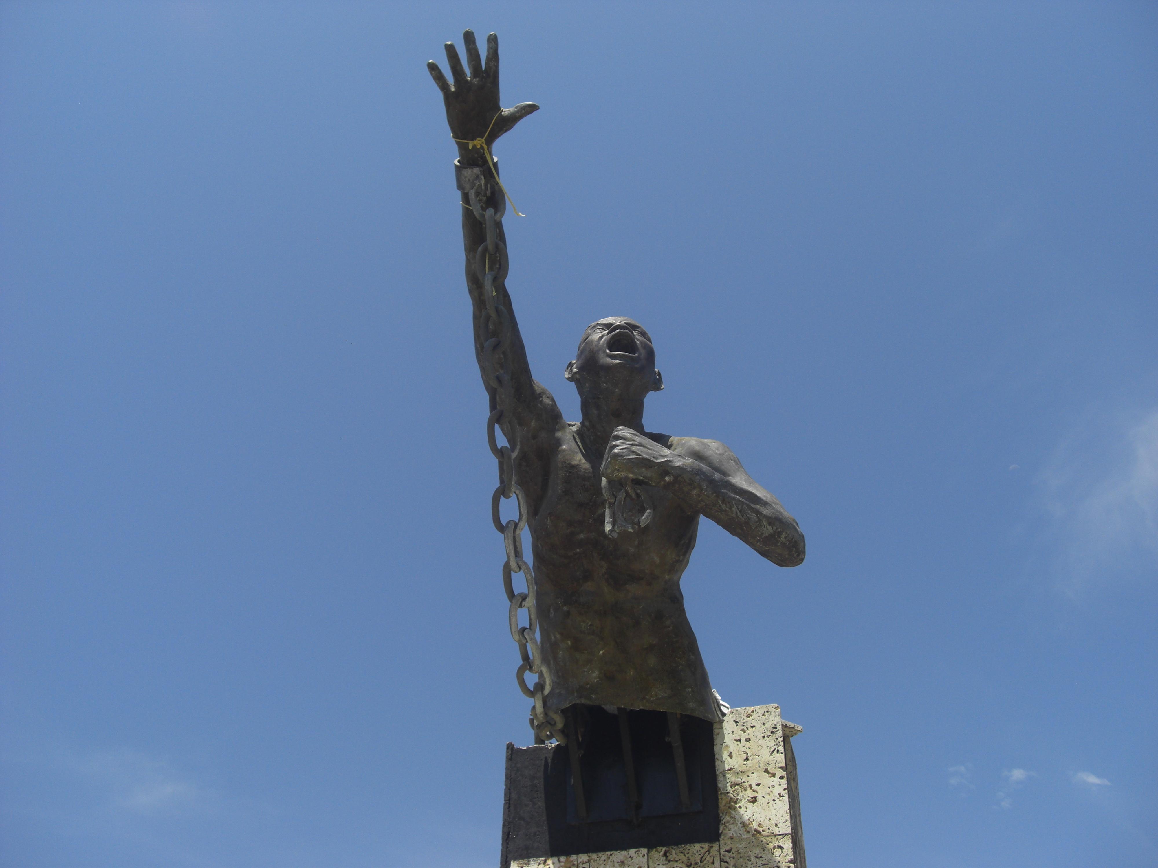 san basilio de palenque